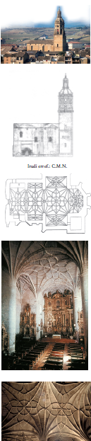 Santiago eliza, Gares